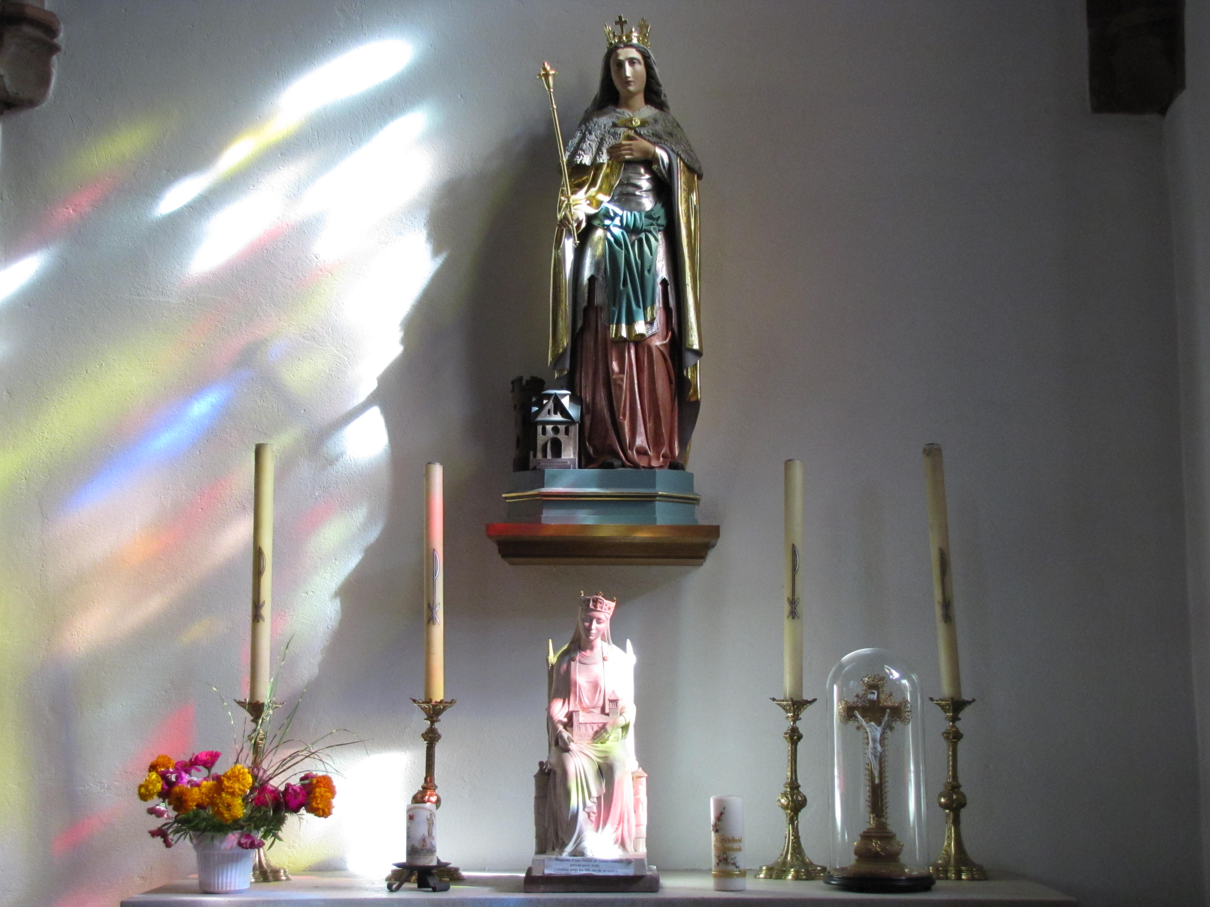 Alsace, Bas-Rhin, Seltz, Église Saint-Étienne (PA67000069, IA67007467): Chapelle Sainte-Adelaïde, Statues néo-gothique et moderne.